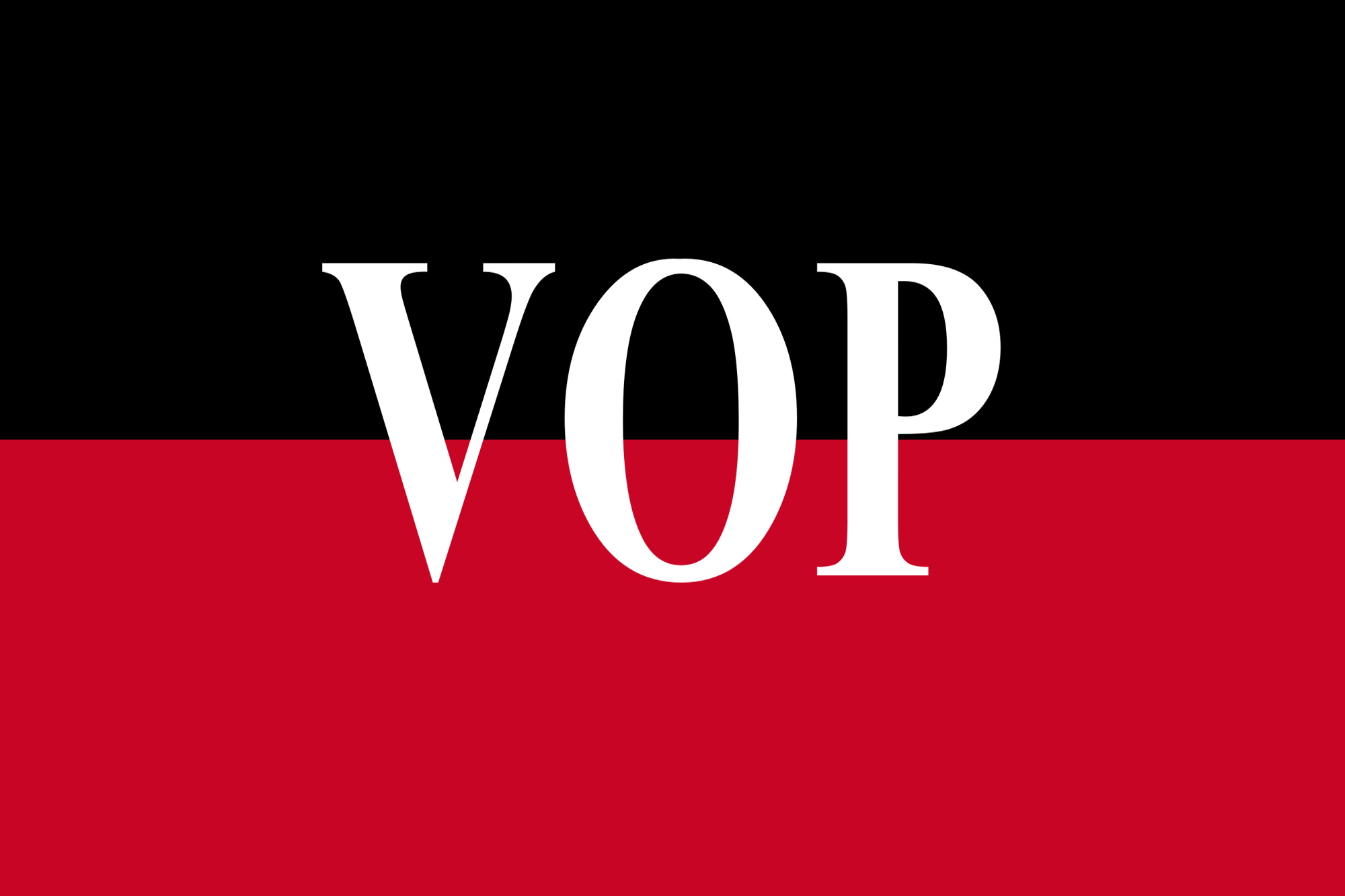 Bandera de la VOP